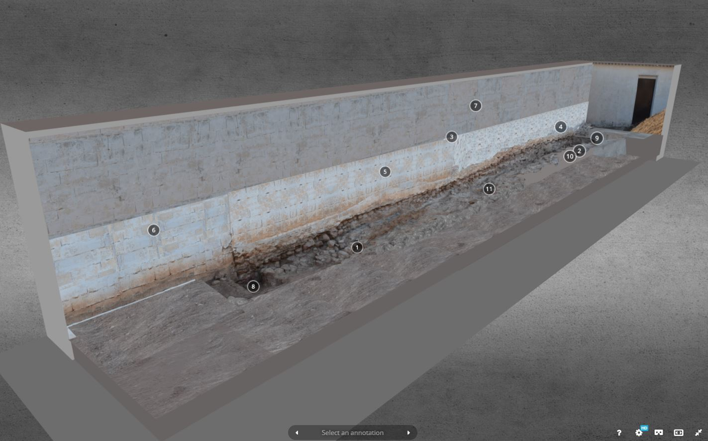 Modelo fotogramétrico del Lienzo Norte de la fortaleza de Santa Catalina (Fuenllana, Ciudad Real, Castilla-La Mancha, España). Corresponde a la campaña arqueológica de 2016 realizada por el Proyecto Arqueológico Santa Catalina (IP: Pedro R. Moya-Maleno). La escala del modelo es de 1:20. El modelo fue procesado por Marcos Galeano Prados como práctica del laboratorio del proyecto en la Universidad Complutense de Madrid. Realizado con software libre Blender v. 2.78c.